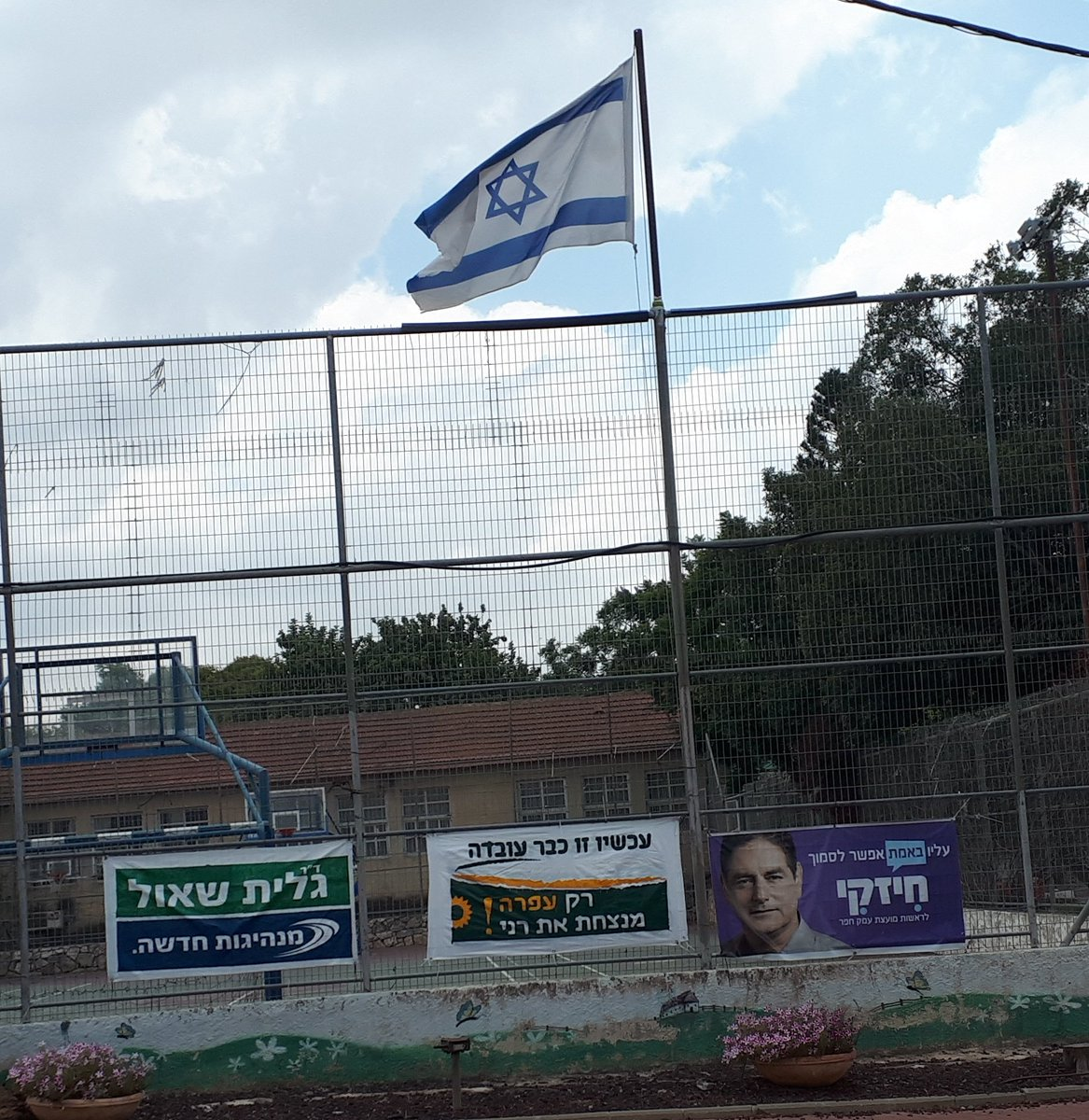 שלטי בחירות למועמדים לראשות מועצת עמק חפר,2018